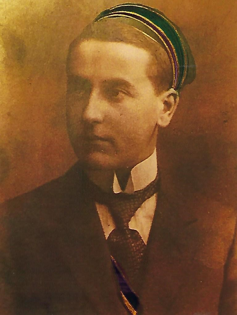 Porträtfotografie von Rudolf Diederichs